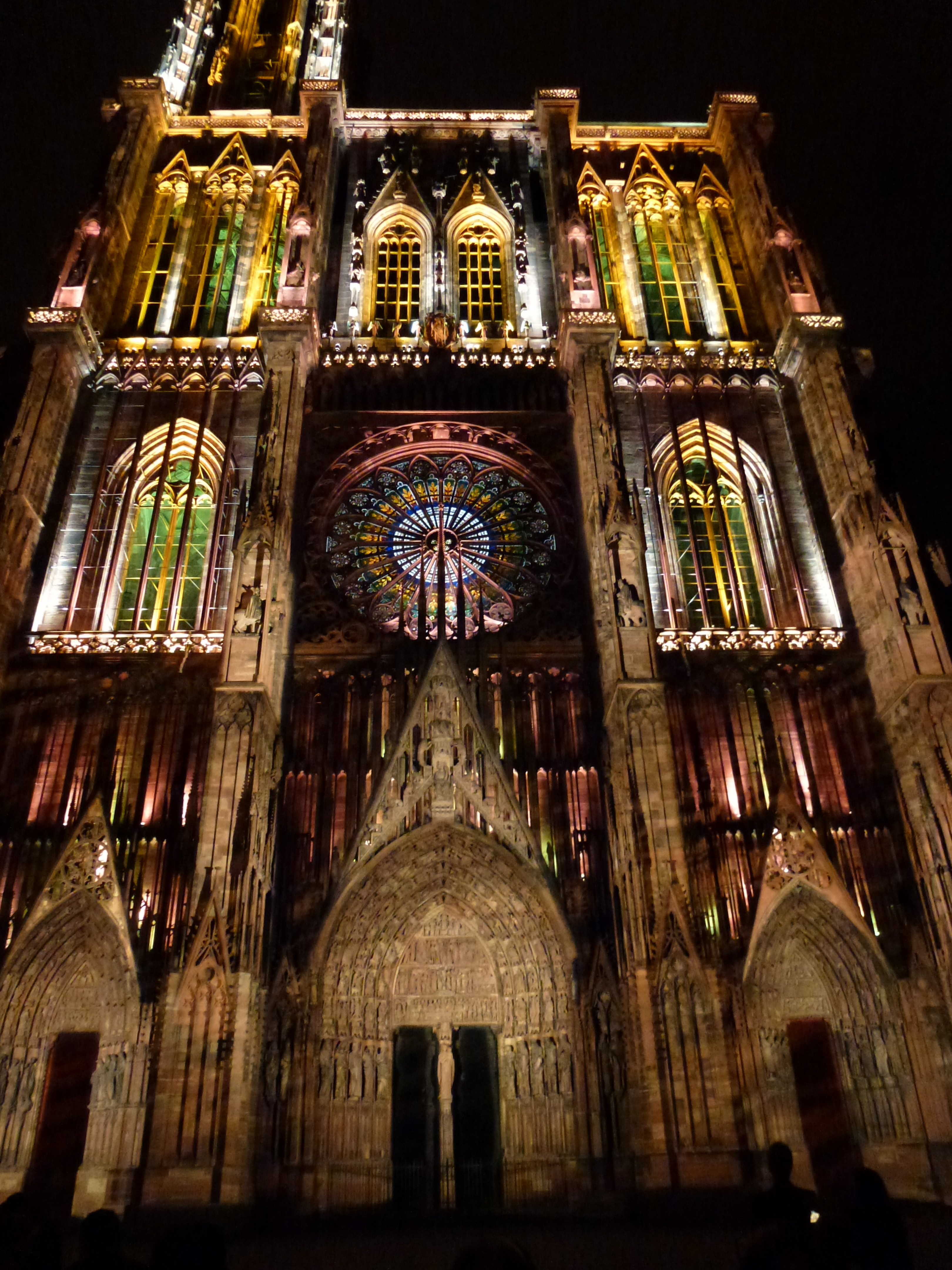 Das Straßburger Münster als Motiv für das " Spectacle son et lumière"